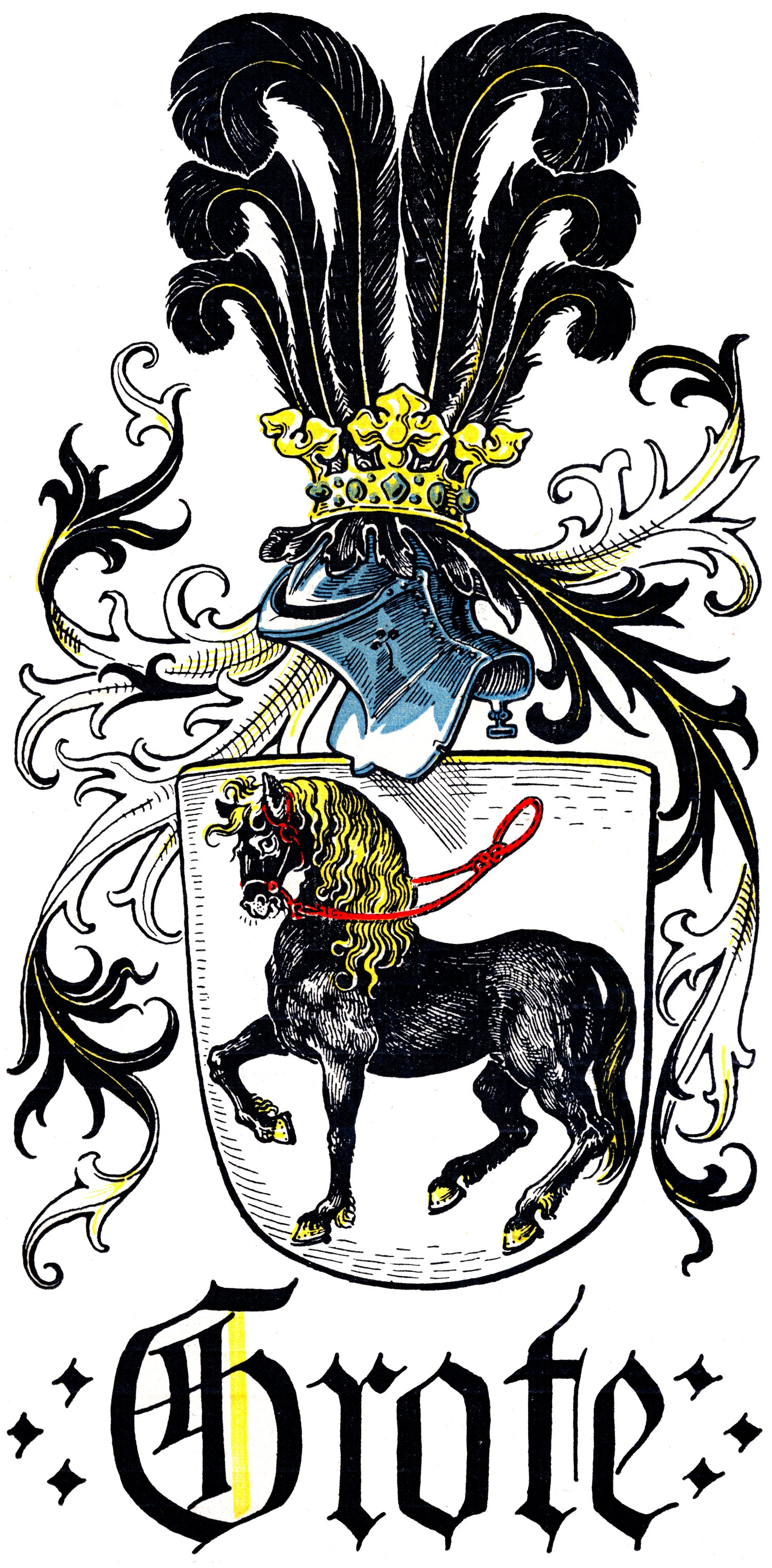 Wappen derer von Grote